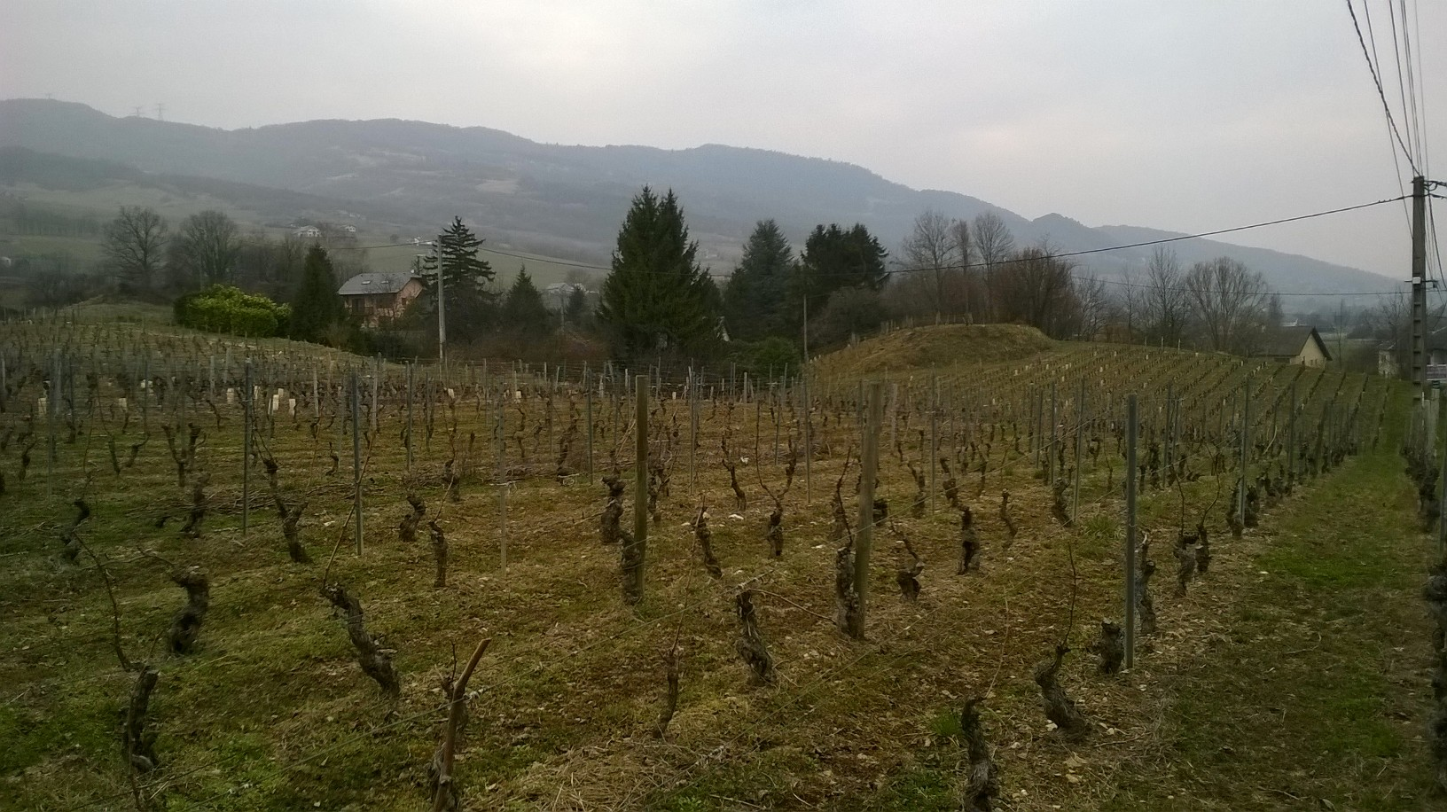 Paysage caractéristique des vignobles des Abymes (éboulis du Mont Granier), commune d'Apremont, vue vers le nord-ouest.